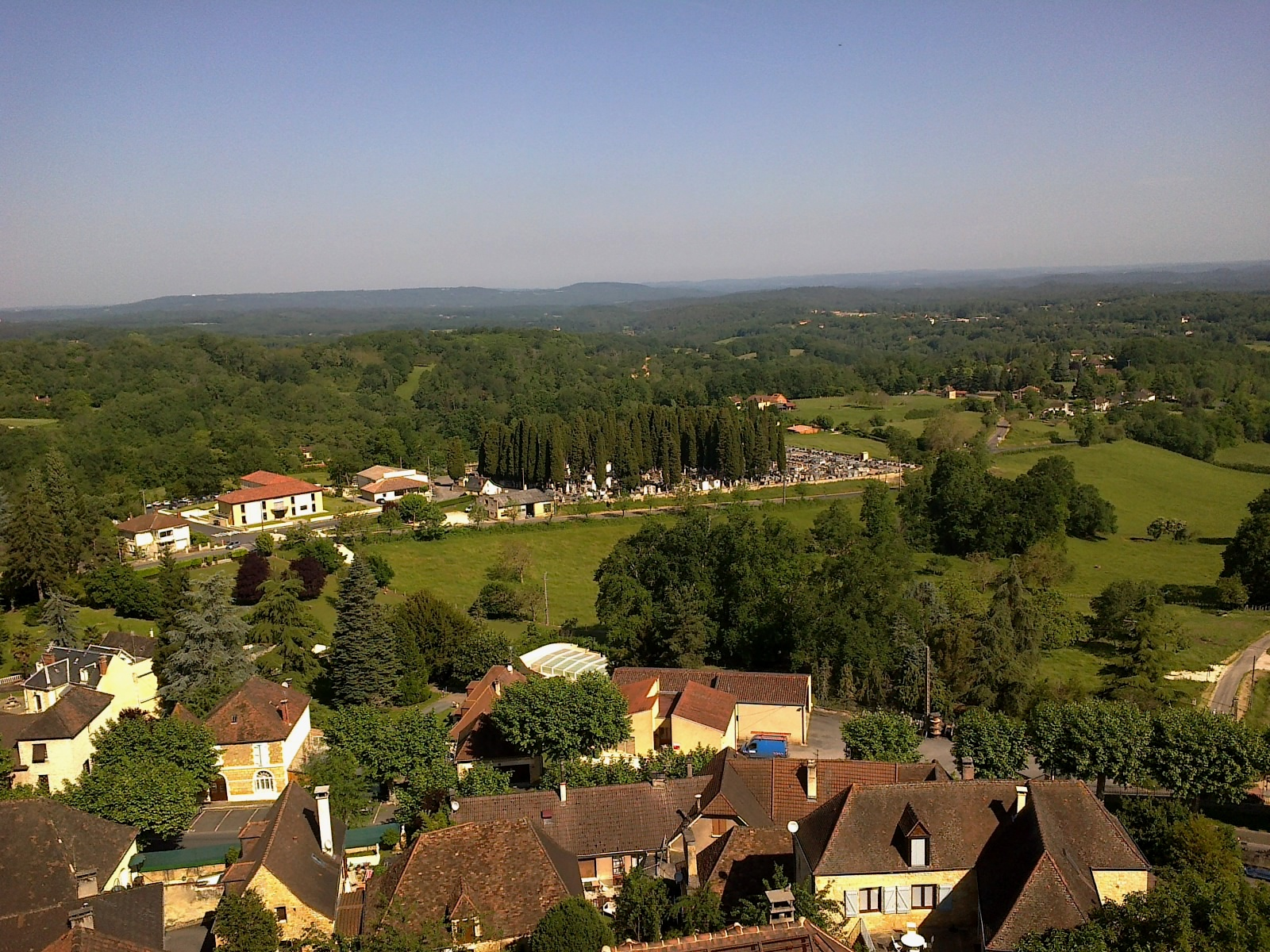 Lot Gourdon L'Esplanade Panorama 29052012